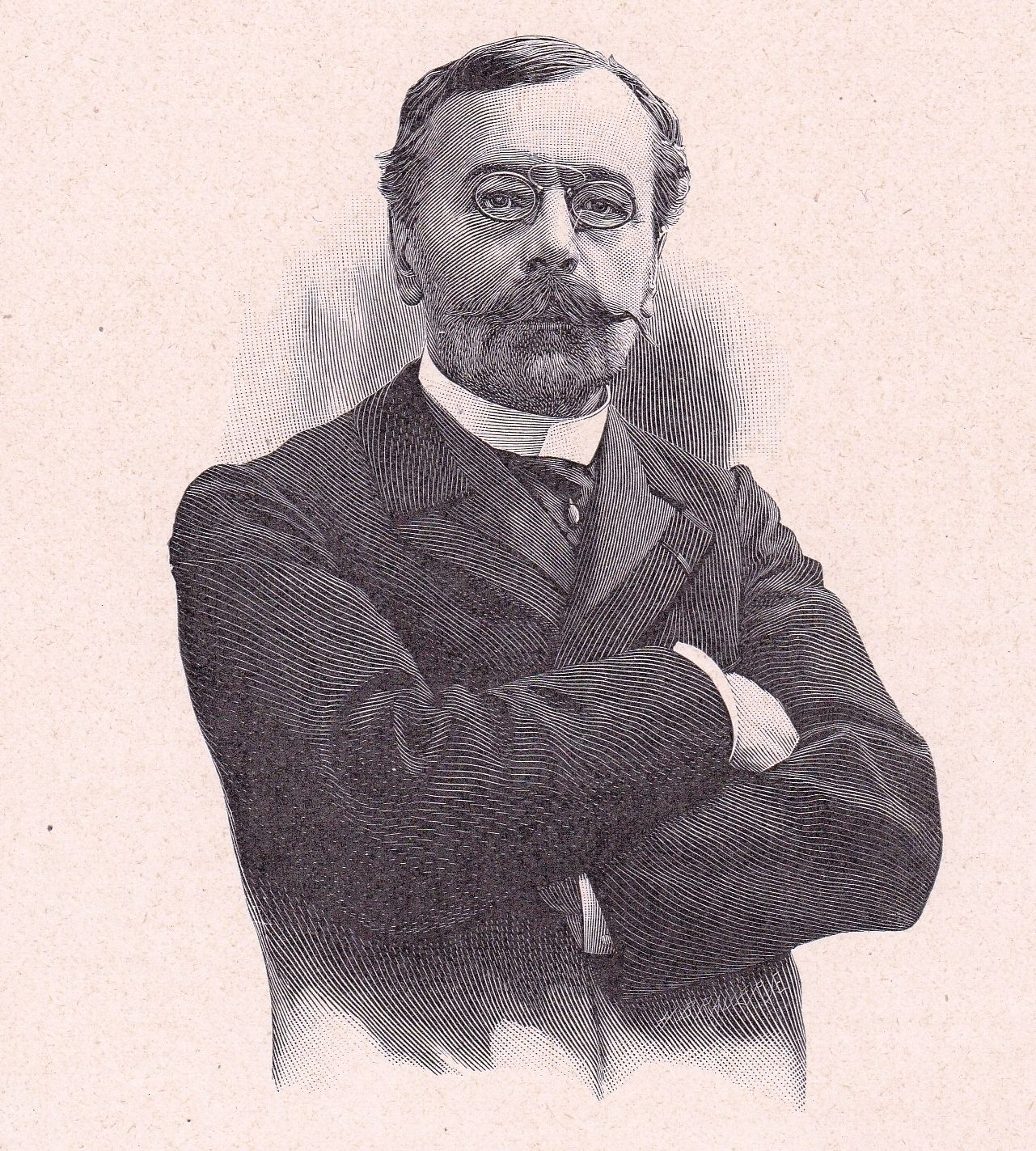 Dessin portrait d'Albert Dastre